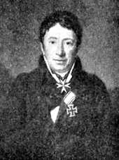 Porträt von Friedrich von der Schulenburg (1769-1821)